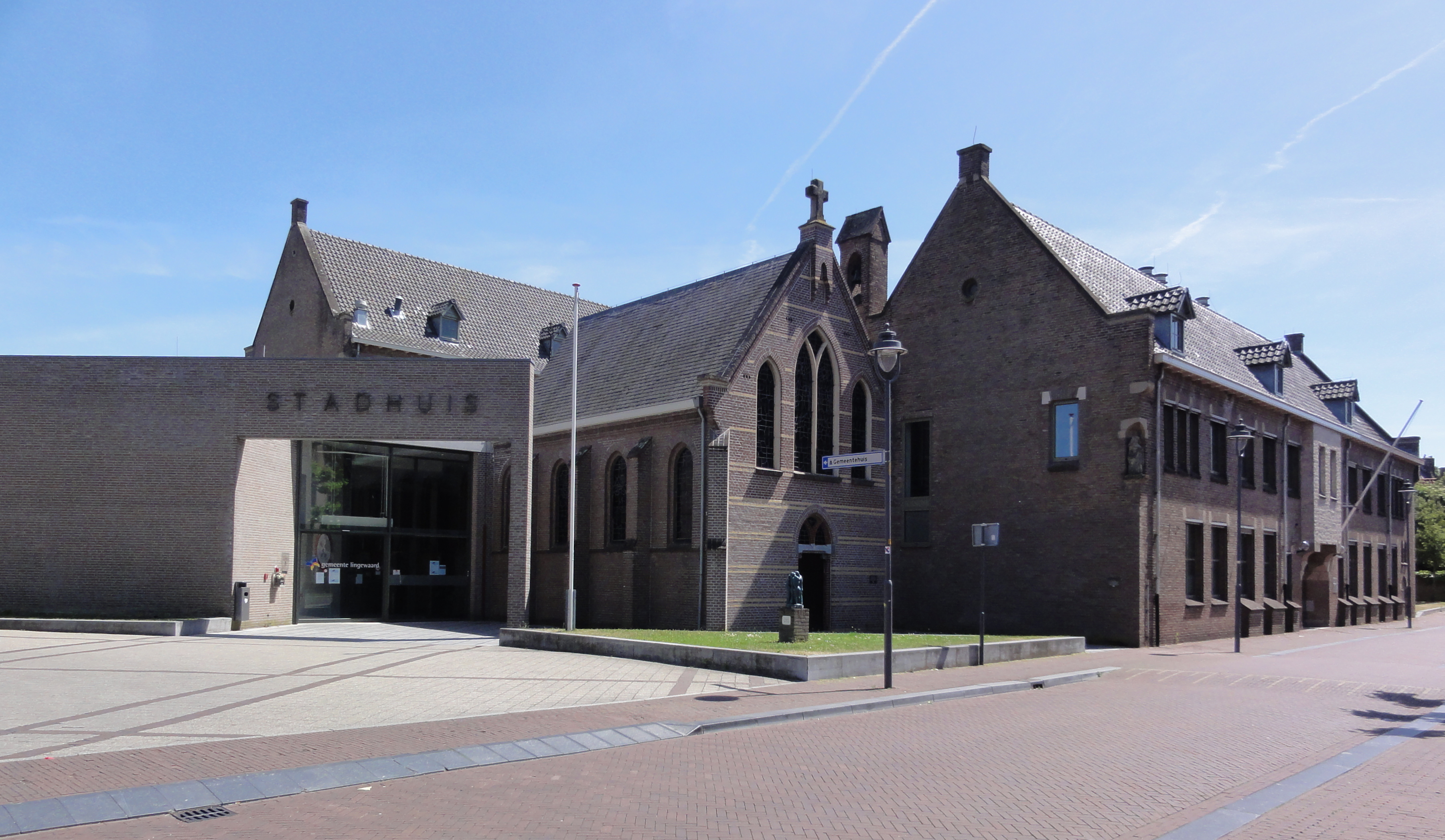 Huissen (Lingewaard) gemeentehuis, voormalig kloostercomplex met nieuwbouw ertegenaan